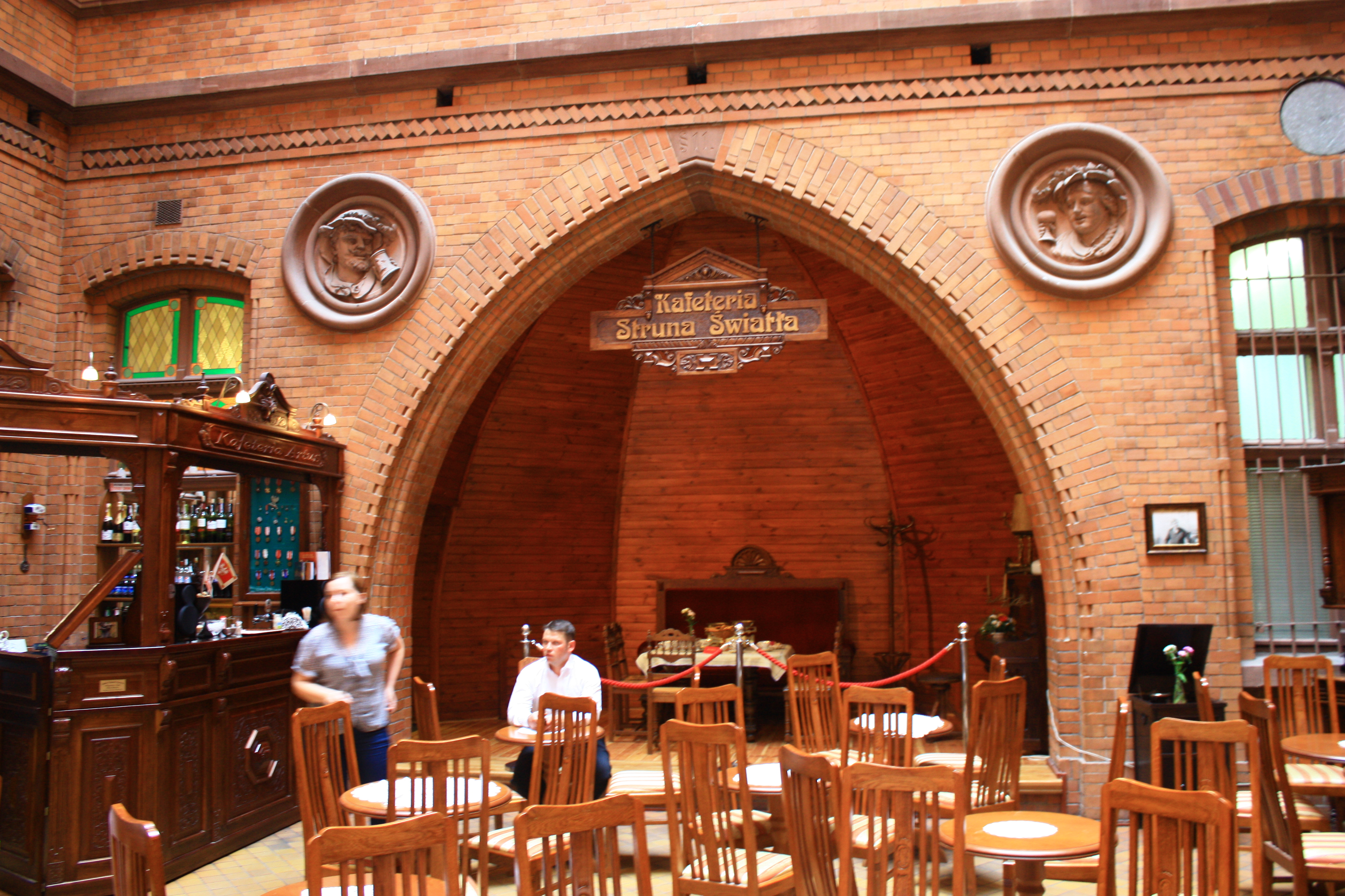 Toruń, Dwór Artusa, 1889-1891